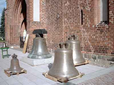 Neue Glocken für die Maria-Magdalenen-Kirche in Eberswalde, Deutschland.